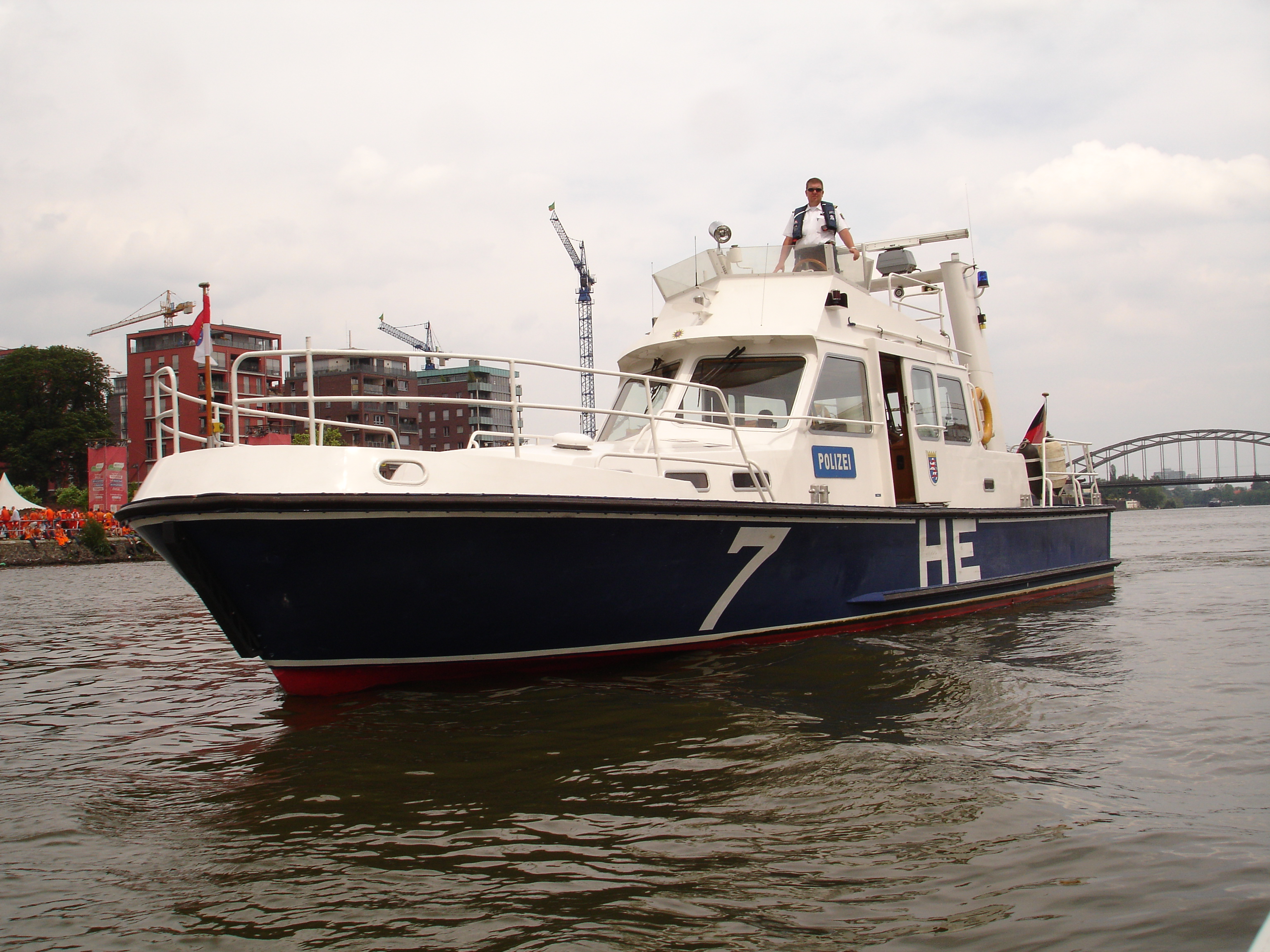 Boot der Wasserschutzpolizei Hessen (Deutschland, Gernsheim)/ Boat from the River Police Hesse (Germany, Gernsheim)